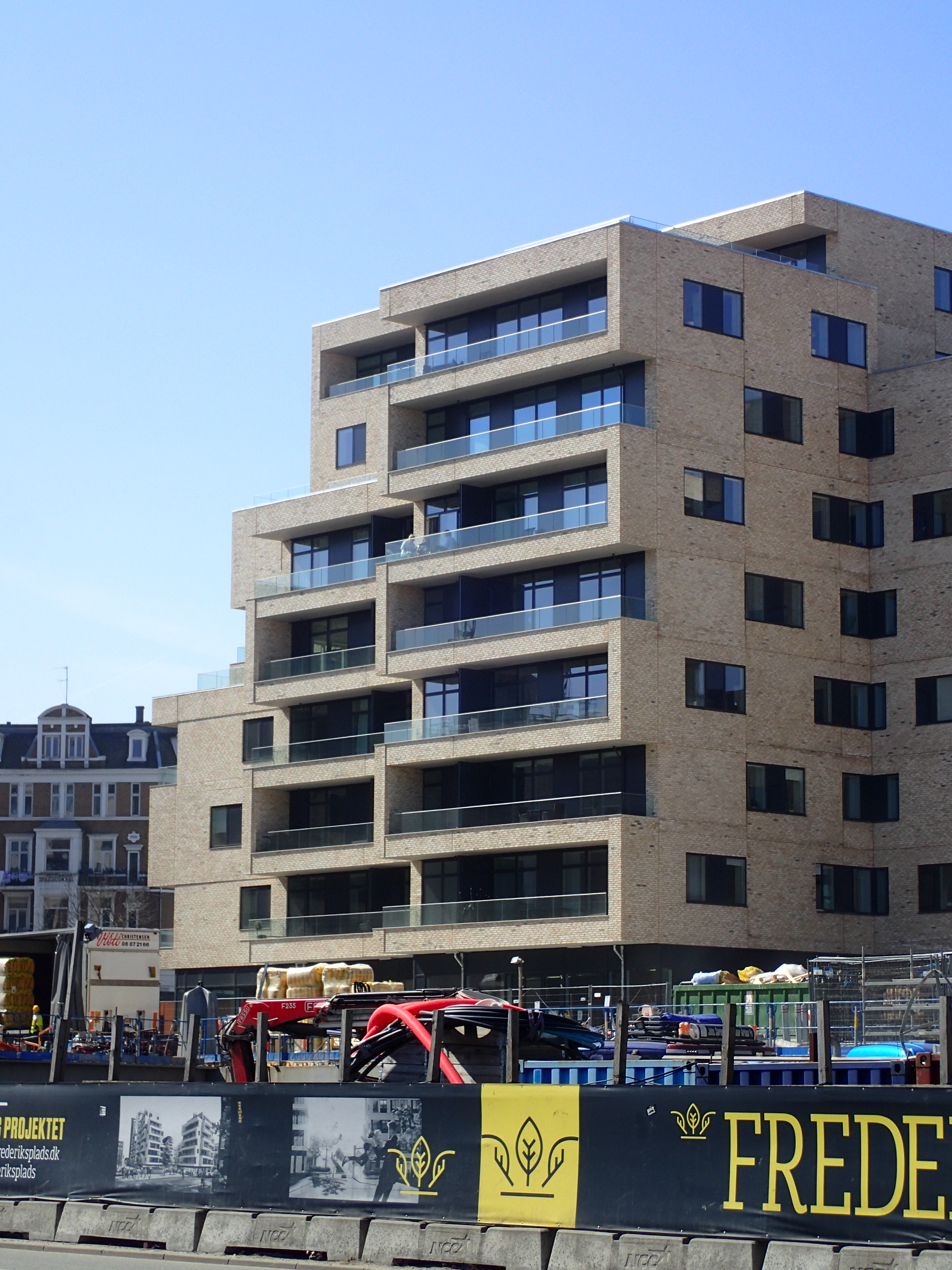 Byggeri til lejligheder og erhverv på Frederiks Plads.